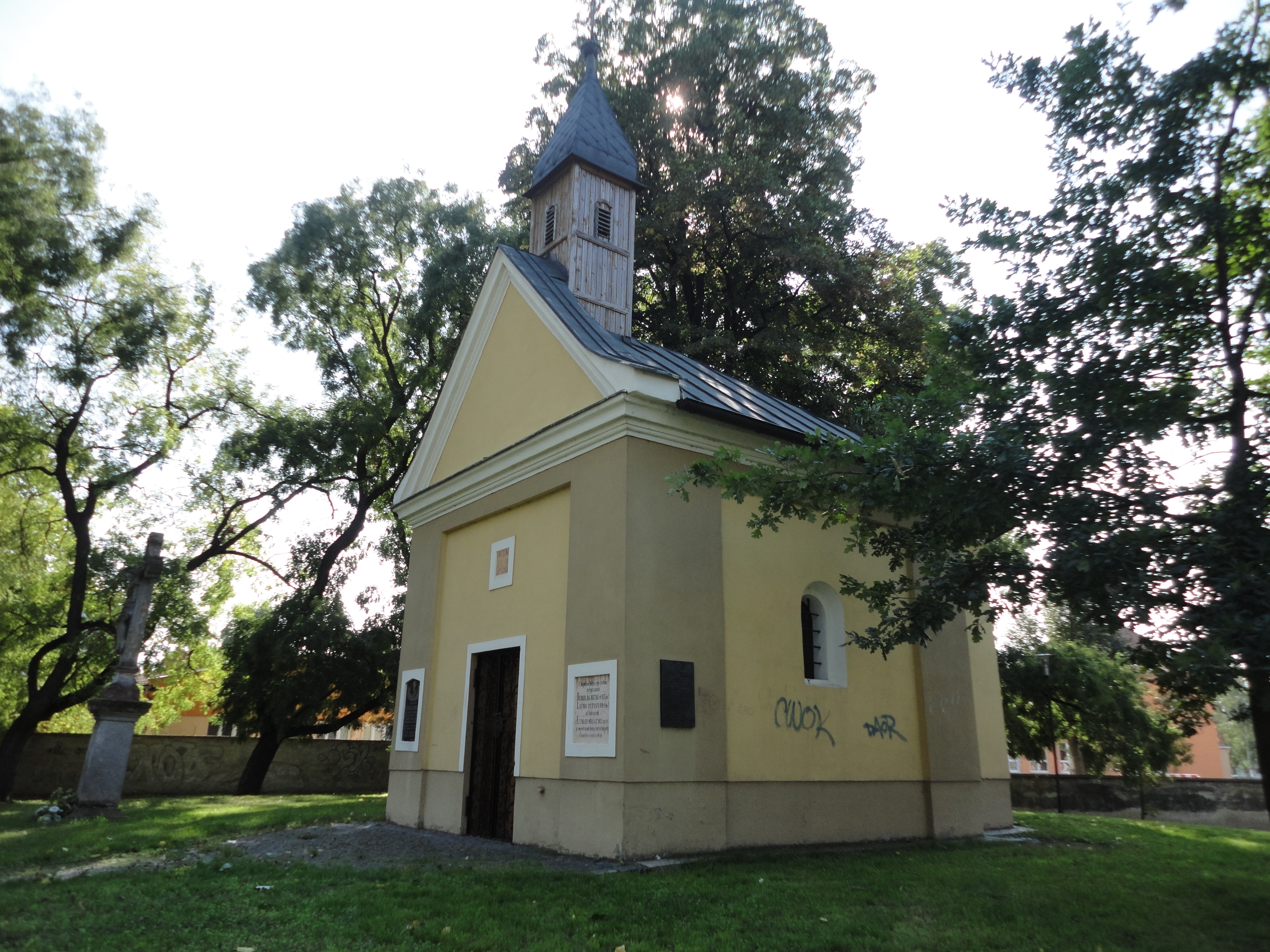 Kaplnka pamätná